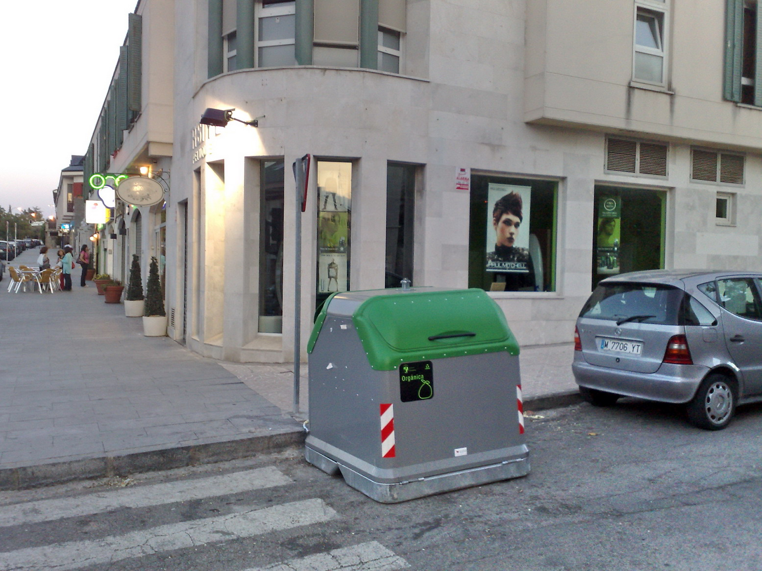 Torrelodones. Contenedor easy en calle Camino de Valladolid